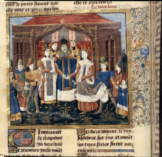 Mariage de Chilpéric Ier et Galsuinthe. Manuscrit du XVème siècle, Bibliothèque Nationale de France, Paris.